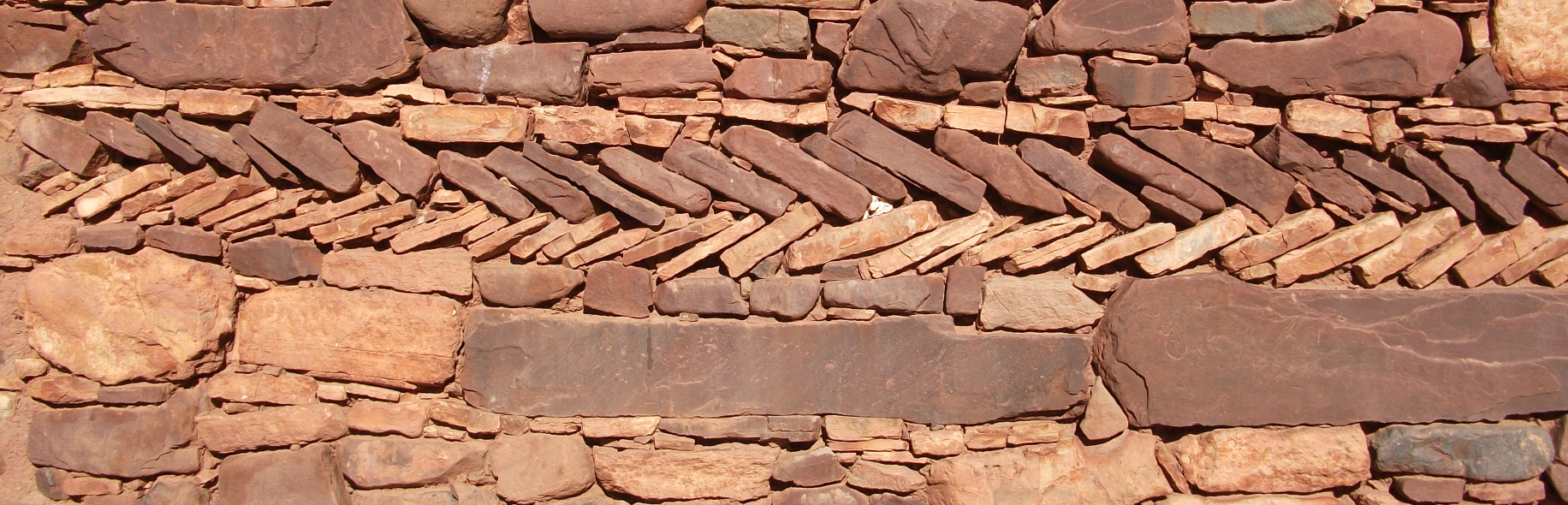 Ighrem n’Ougdal, Fischgrätmuster